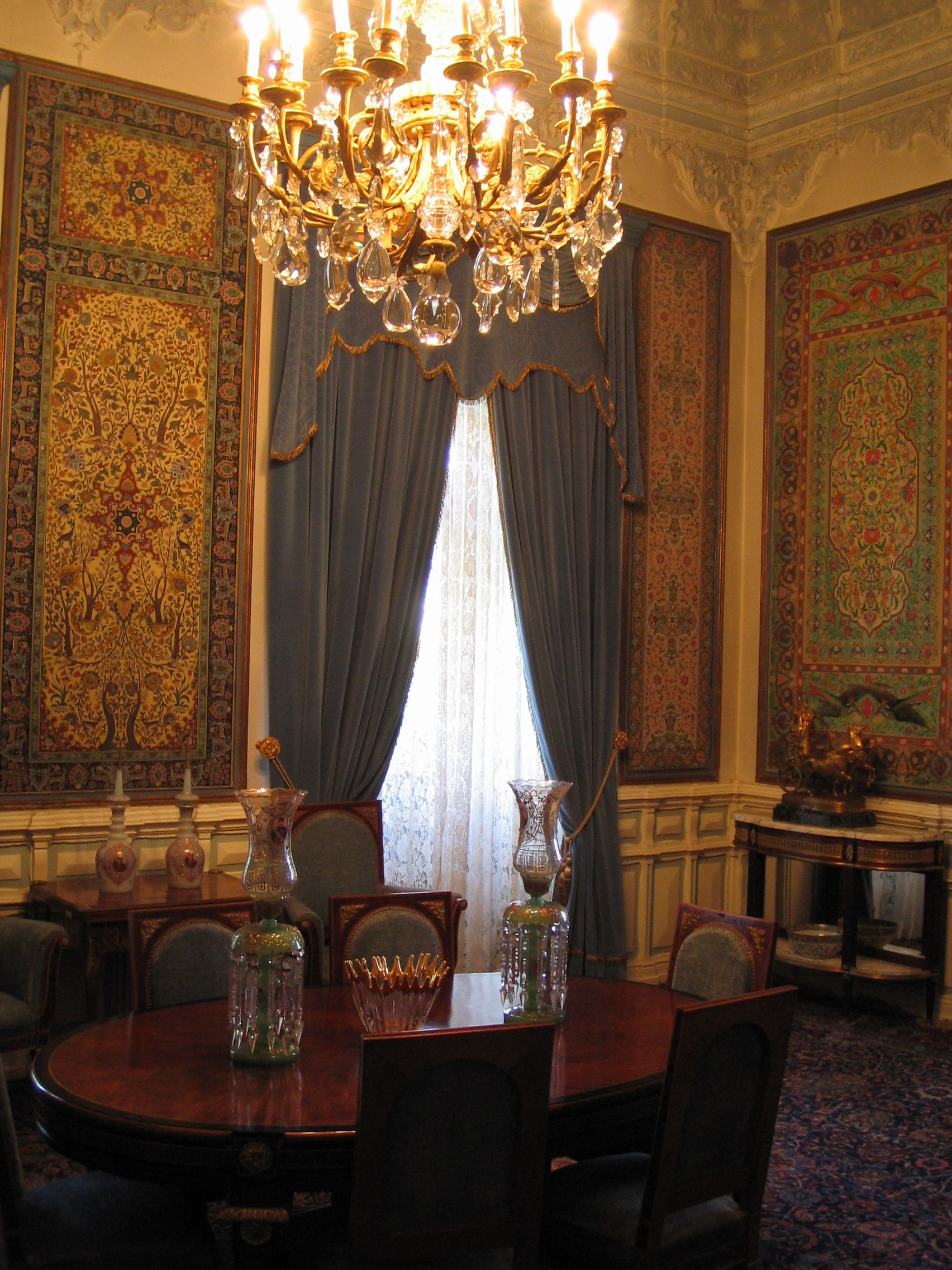 room in Kakh-e Sadabad, Tehran, Iran